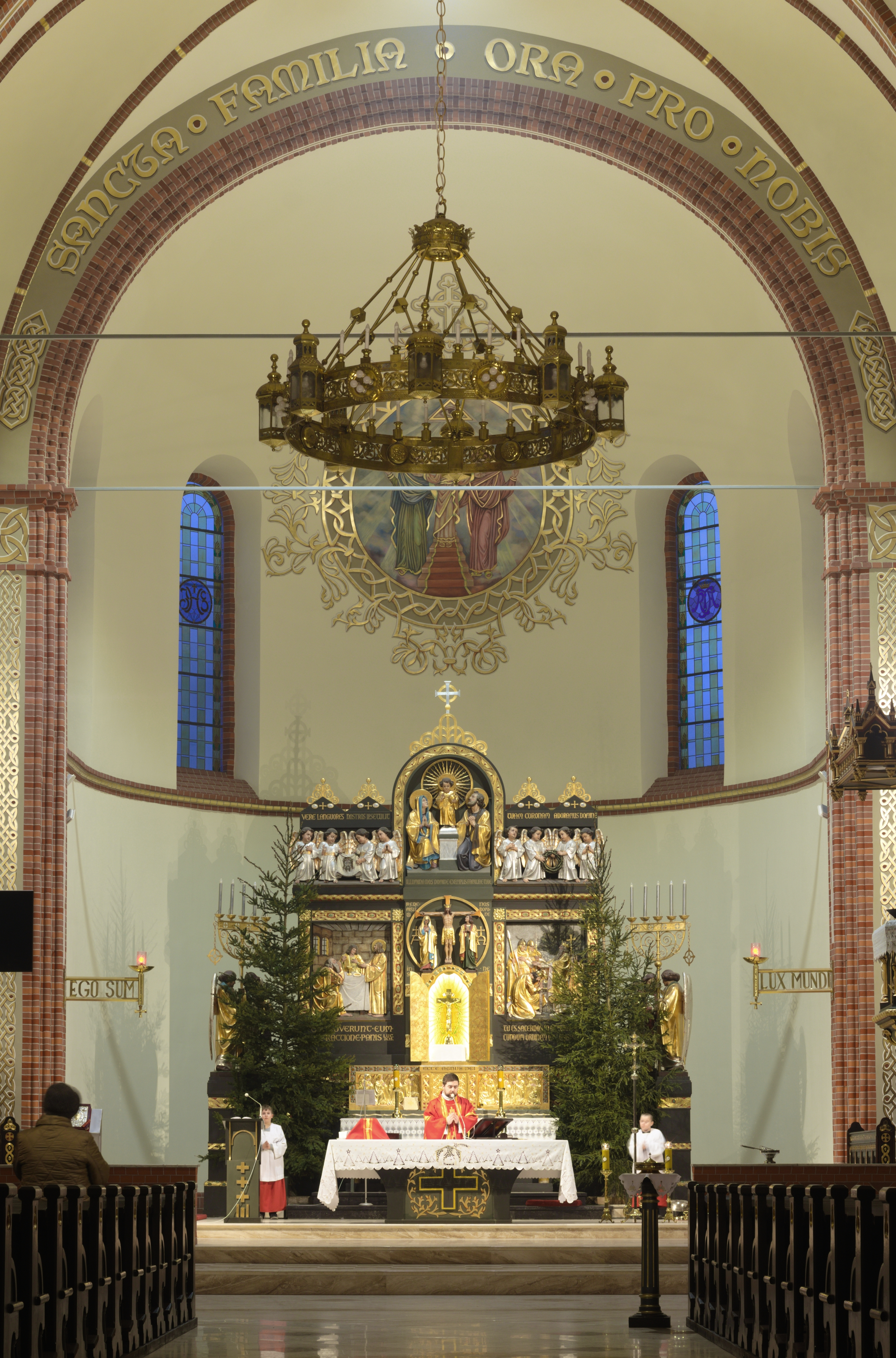 prezbiterium z ołtarzem głównym kościoła Świętej Rodziny w Bytomiu-Bobrku